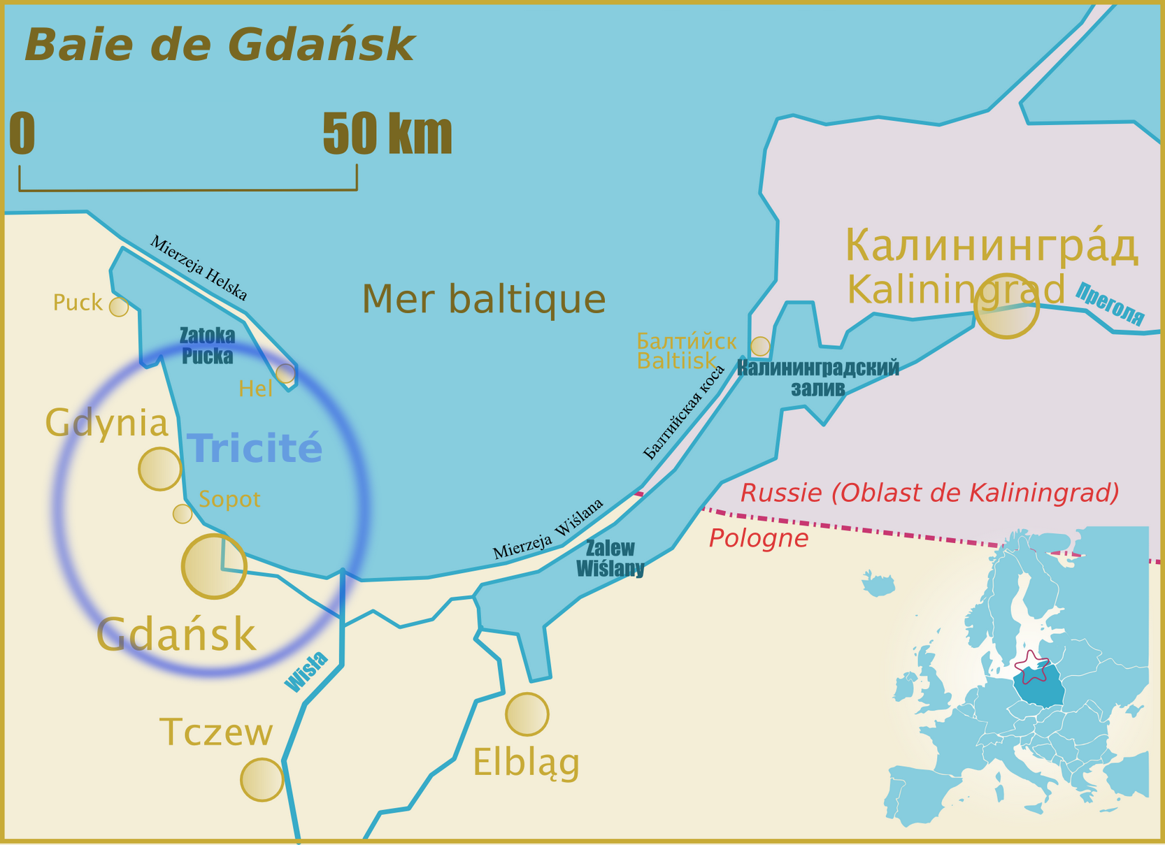 Adaptée de Bay_of_Gdańsk_Zatoka_Gdańska.png (carte simplifiée et francisée, ajout de l'emplacement approximatif de la Tricité).